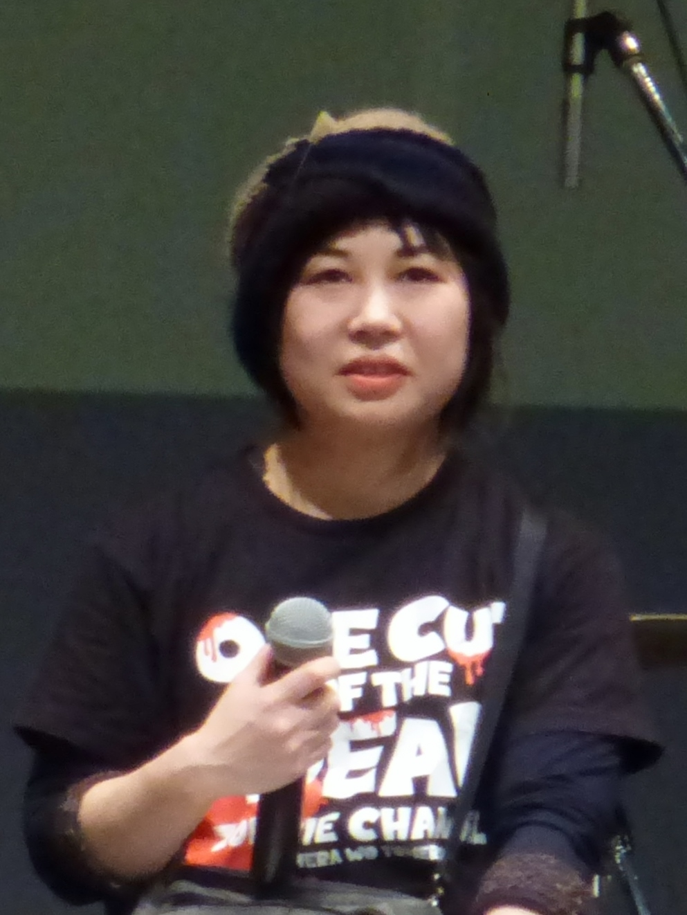 吉田美紀（2018年11月22日、Zeppダイバーシティ東京「最高かよ〜！『カメ止め！』アツアツ感染者集会〜ポンデミック2018〜」）